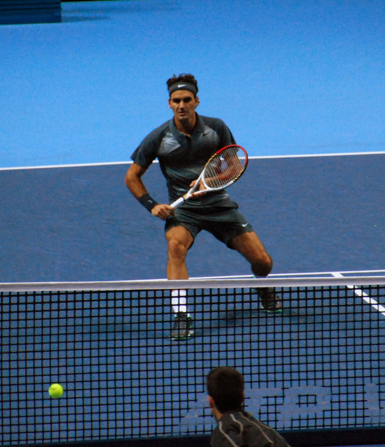 Federer v Djokovic